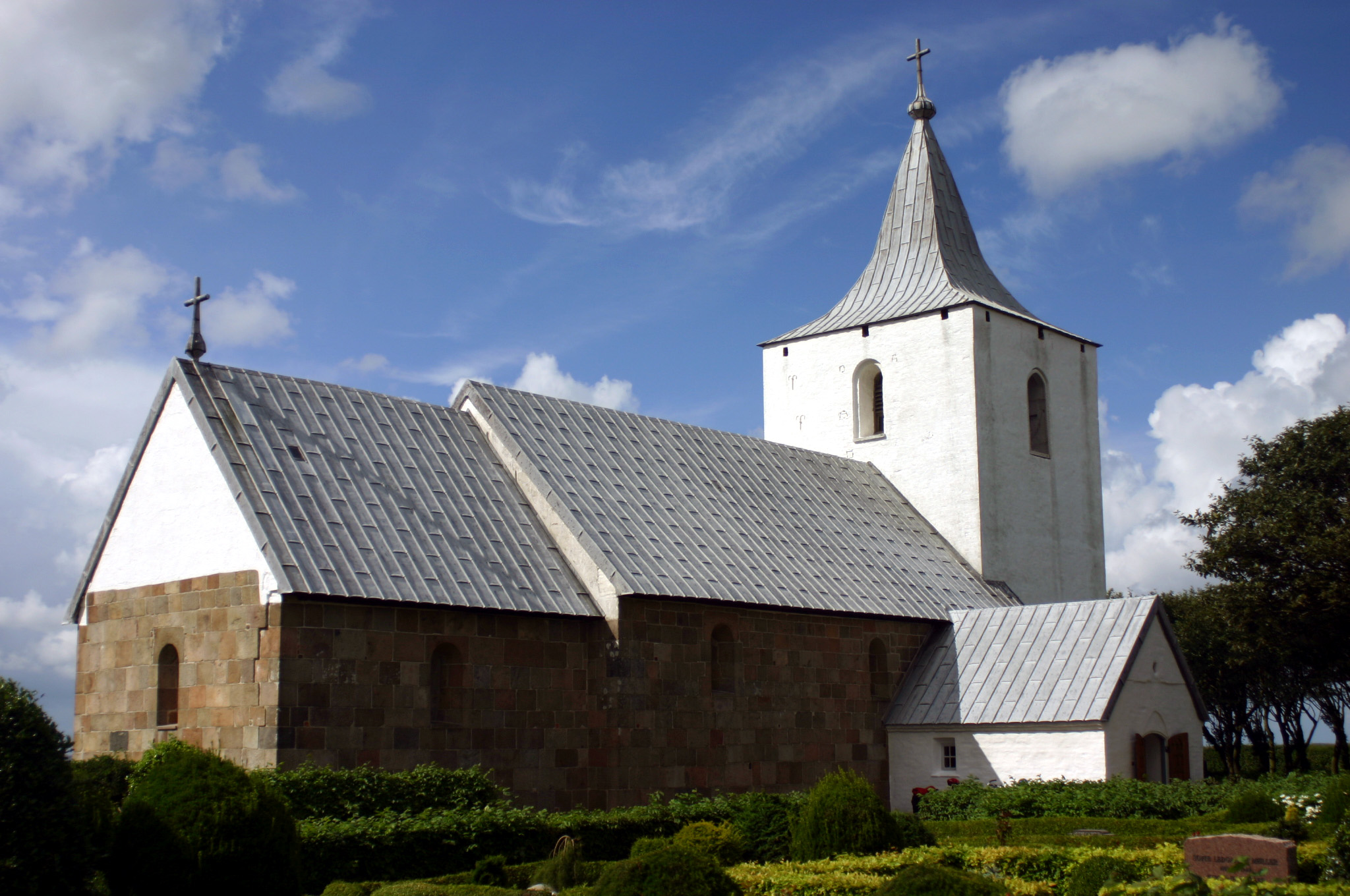 Gammelsogn, Denmark, Church